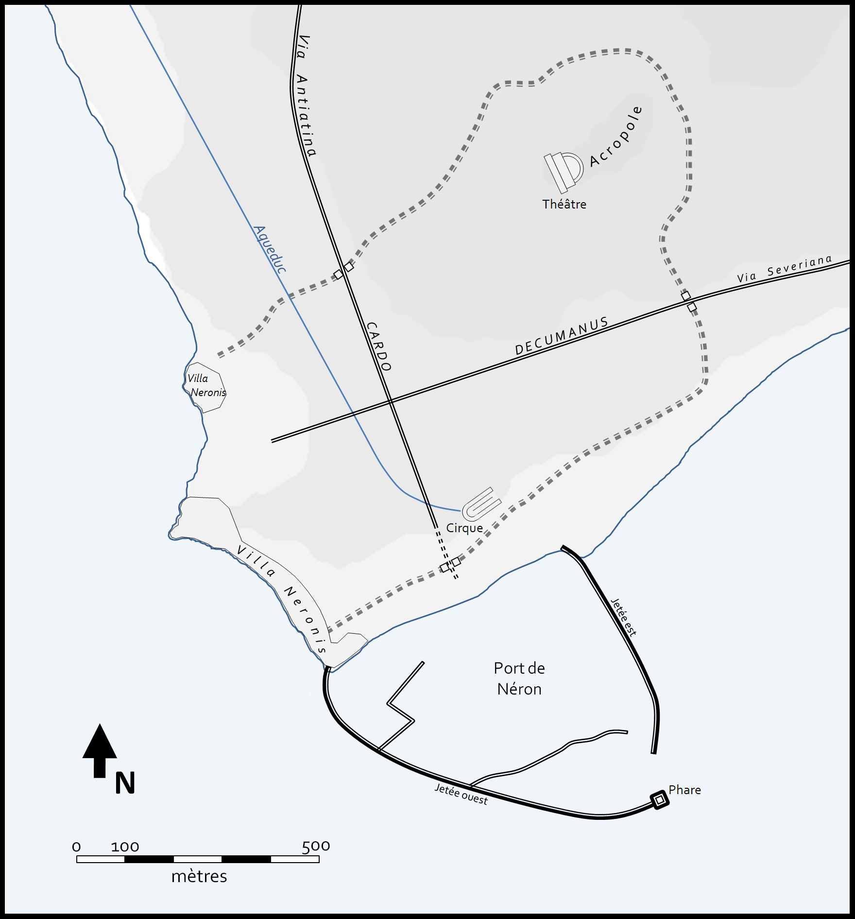 Plan d'Antium Source : G. Lugli, Saggio sulla topografia dell'antica Antium dans Rivista del R. Istuto d'Archeologia e Storia del Arte, VII, 1940